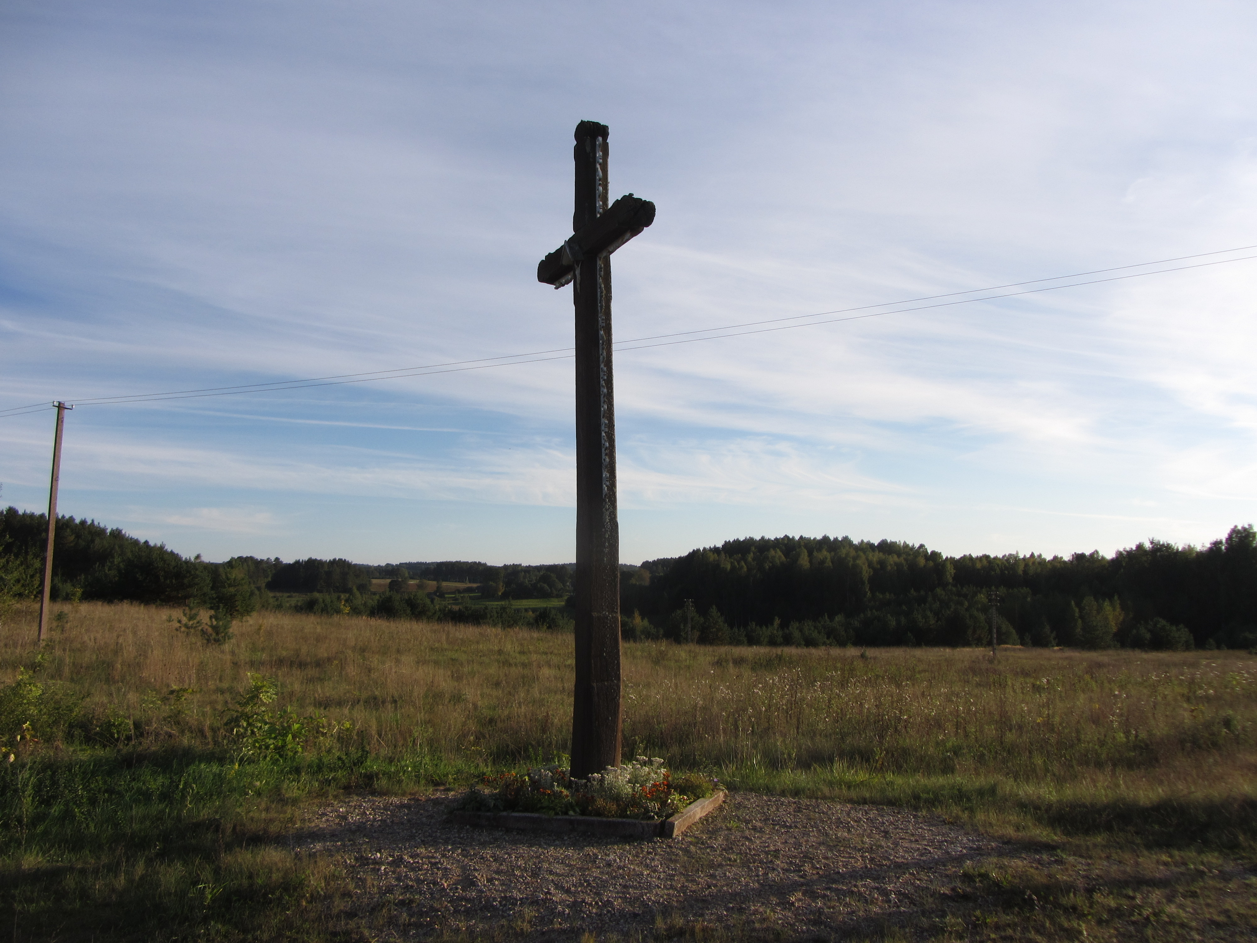 Kryčelės 18101, Lithuania